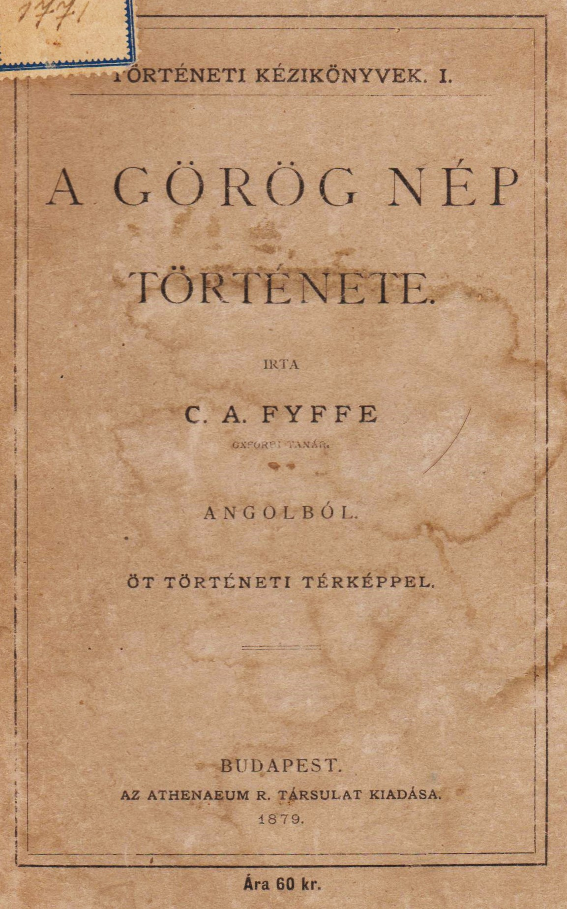 Charles Alan Fyffe (1845-1892): A görög nép története (1879)